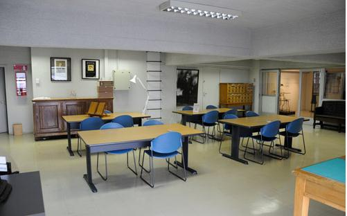 Sala lectura Museo Nacional de Medicina Chile